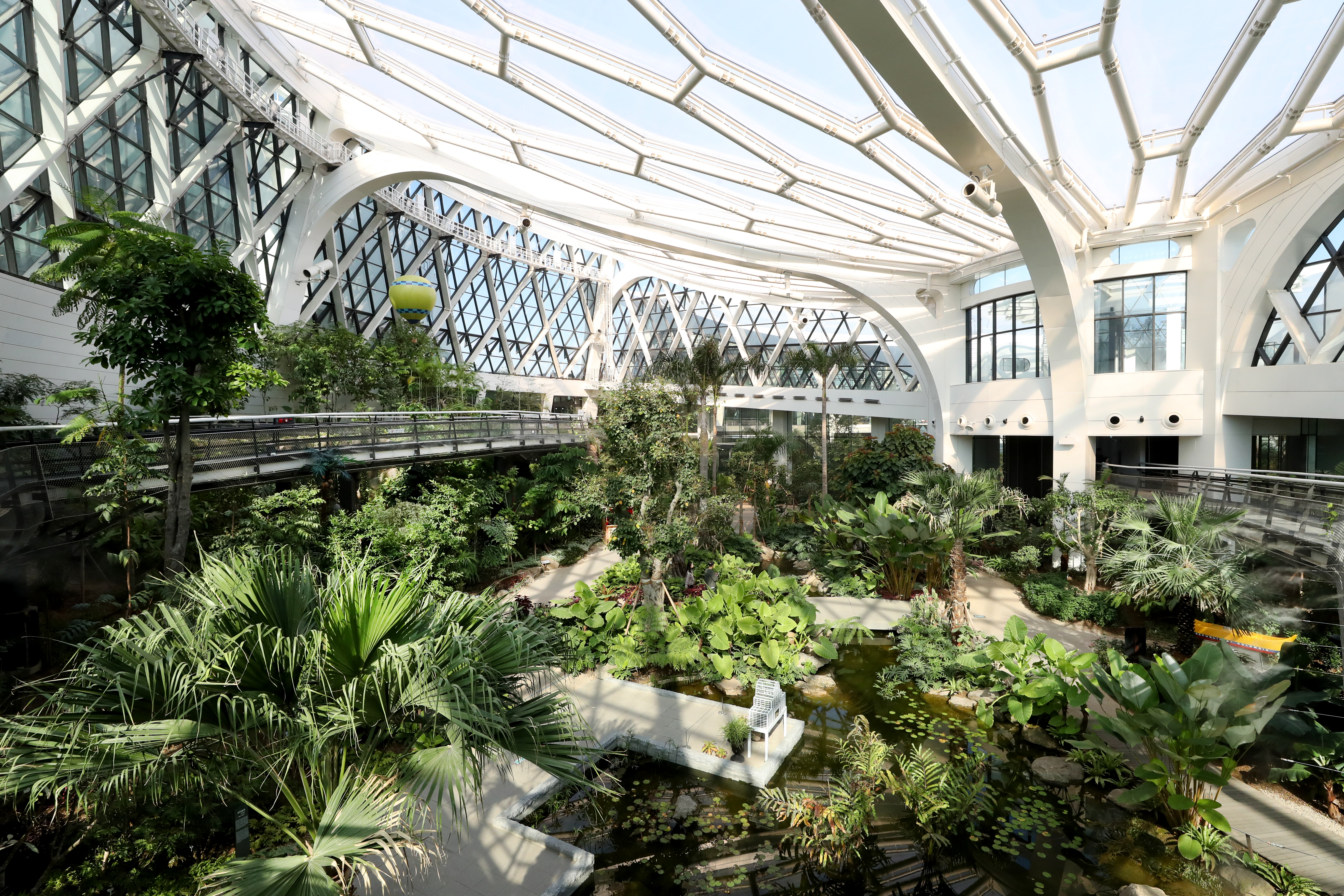 Seoul botanic park May 23, 2019 Seoul botanic park, Gangseo-gu, Seoul Ministry of Culture, Sports and Tourism Korean Culture and Information Service ( Official Photographer : Kim Sunjoo This official Republic of Korea photograph is being made available only for publication by news organizations and/or for personal printing by the subject(s) of the photograph. The photograph may not be manipulated in any way. Also, it may not be used in any type of commercial, advertisement, product or promotion that in any way suggests approval or endorsement from the government of the Republic of Korea. 서울식물원 2019-05-23 강서구 서울식물원 문화체육관광부 해외문화홍보원 코리아넷 김순주